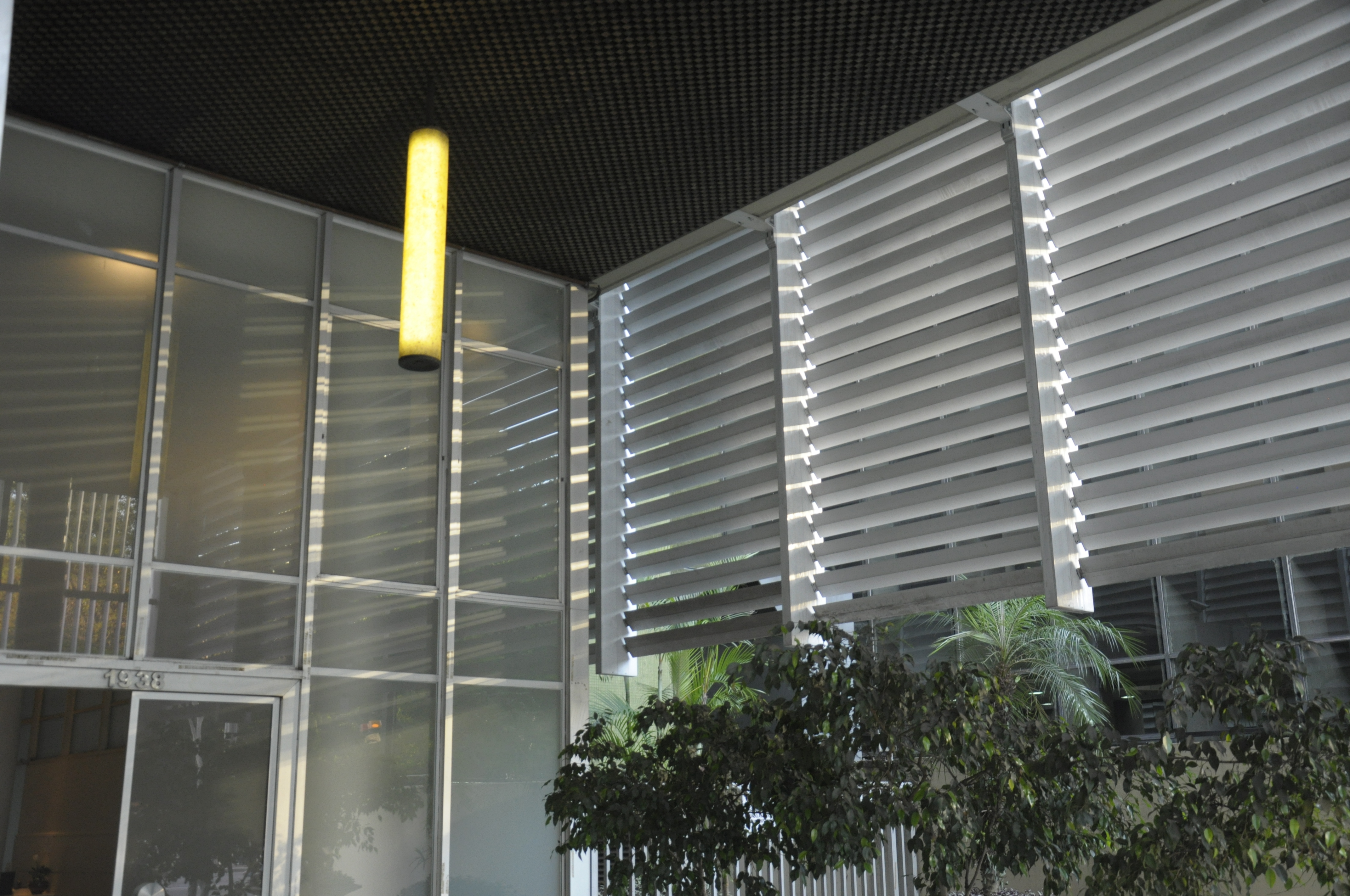 Hall de entrada principal do Edifício Banco Sul Americano - São Paulo (SP), Brasil